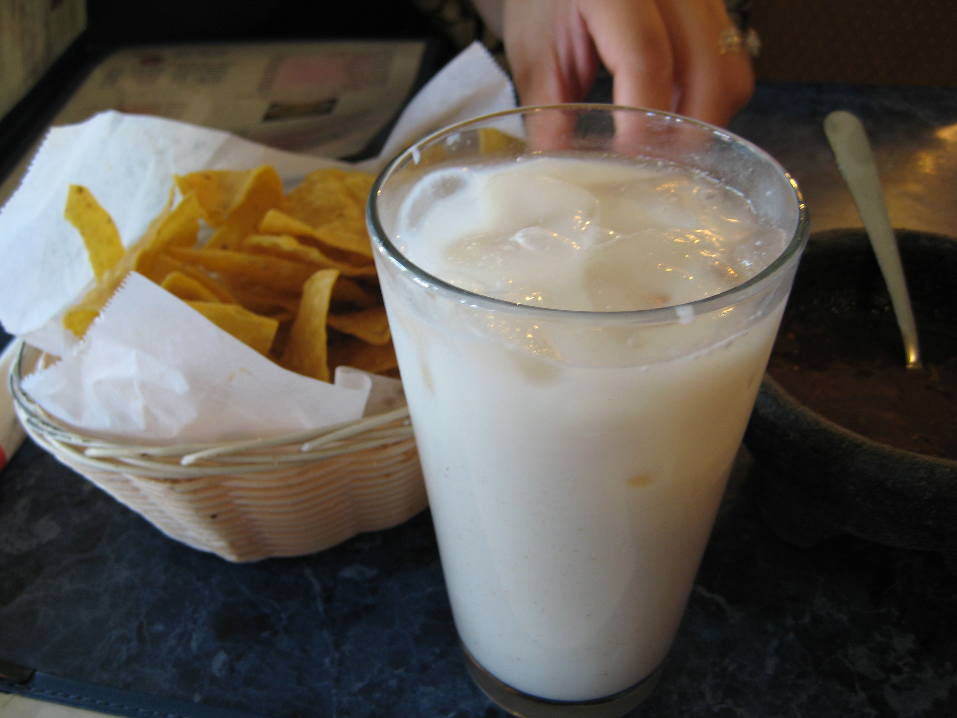 Horchata de arroz, bebida típica mexicana.